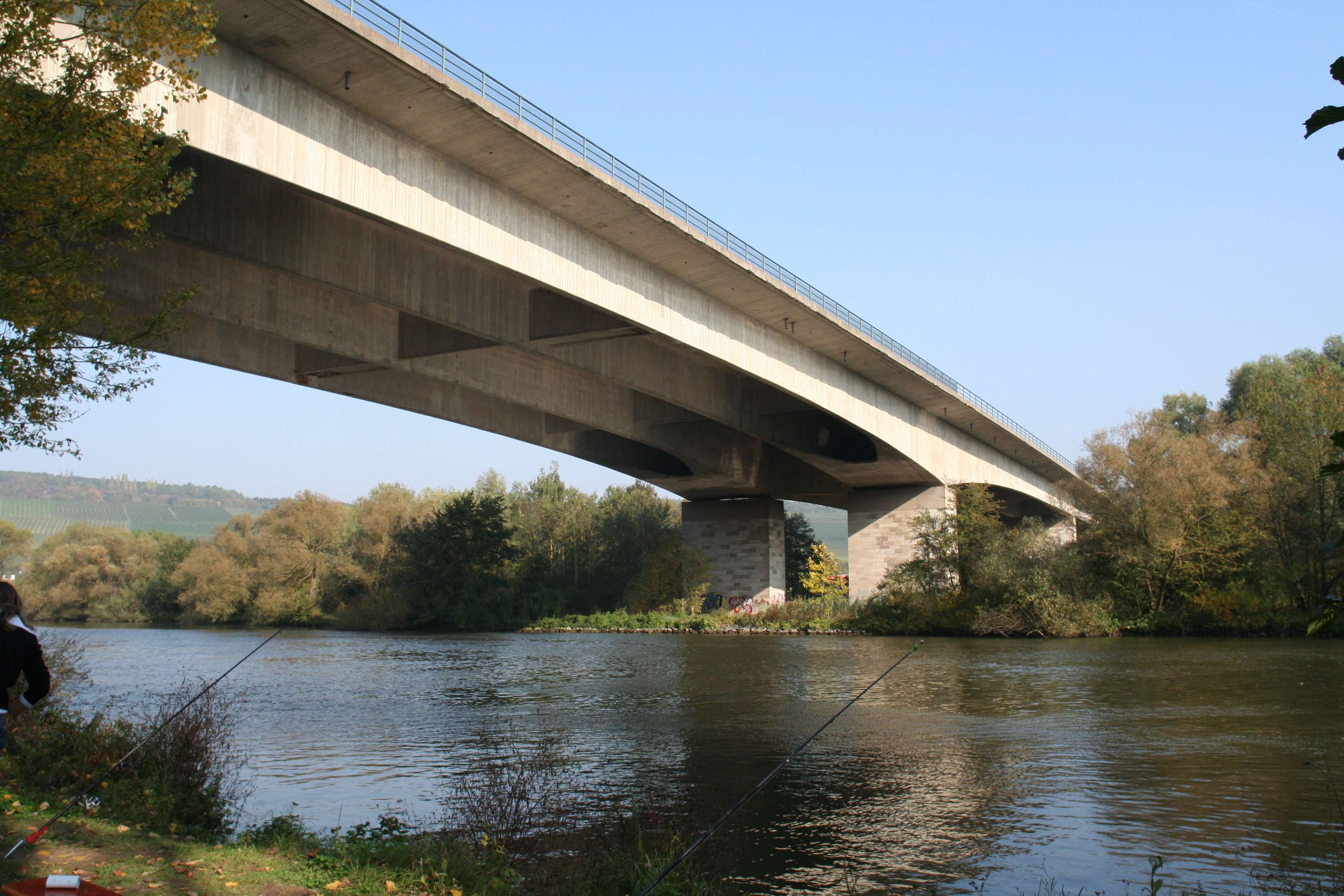 Mainbrücke Randersacker der Autobahn A3 bei Würzburg, linke Mainseite